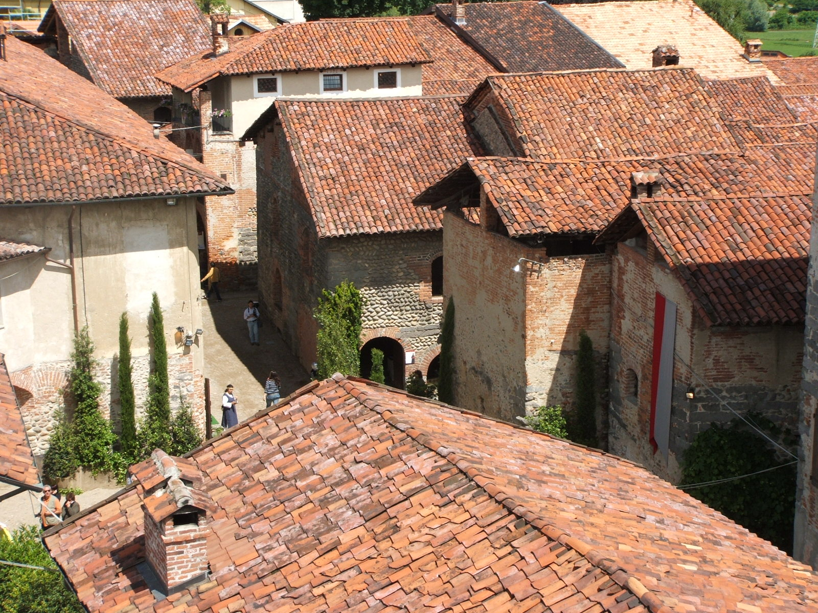 Ricetto di Candelo, provincia di Biella, Piemonte, Italia